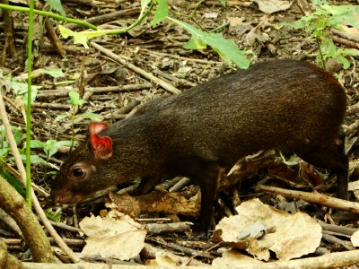 Picure (Género Dasyprocta) en el Parque nacional Henri Pittier, Maracay, Venezuela